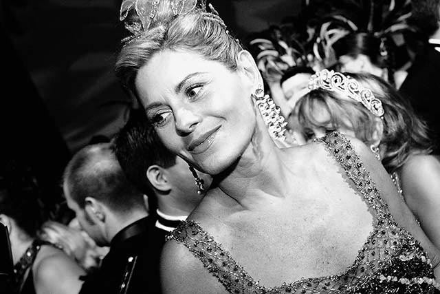 Brazillian actress Vera Fischer.